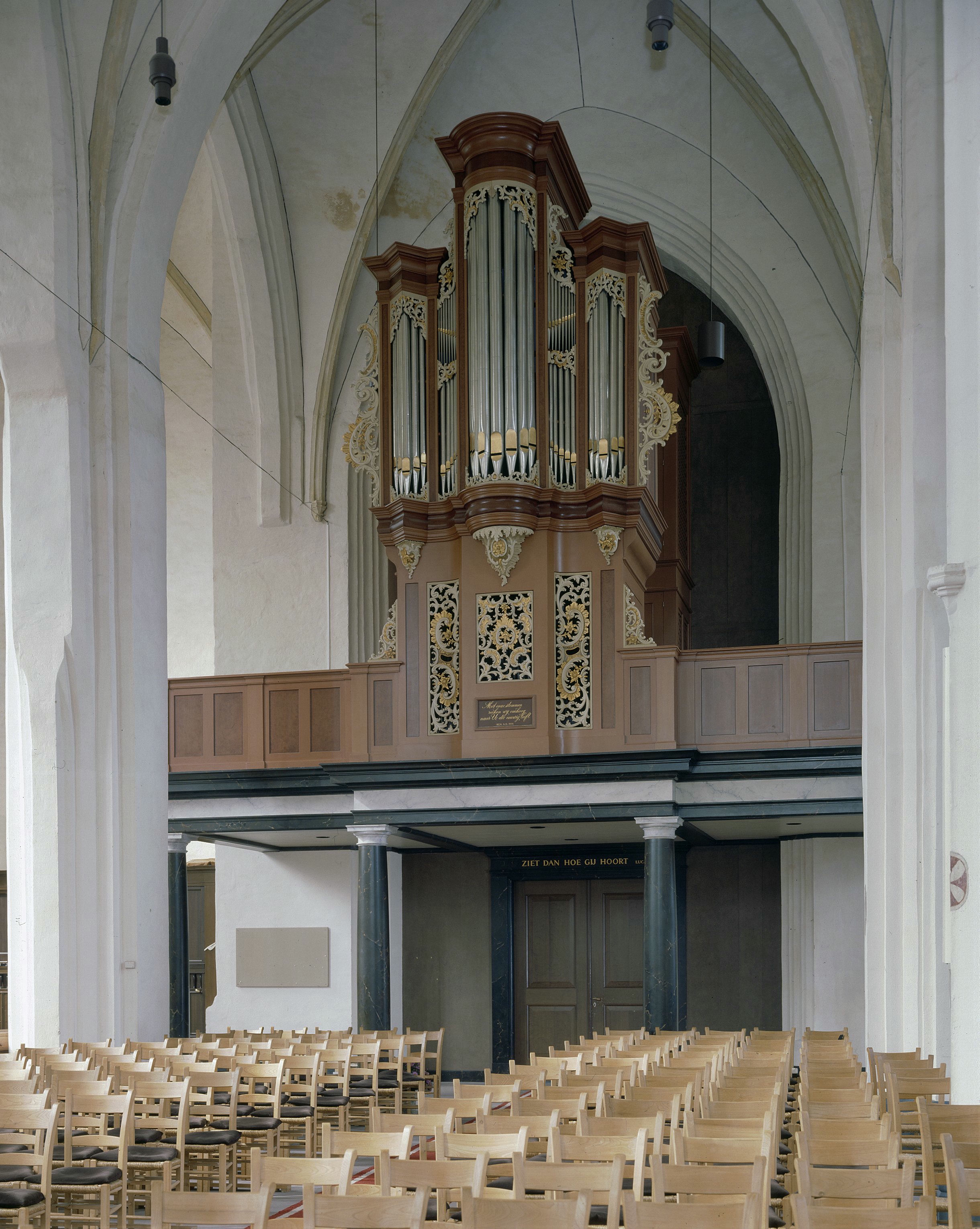 Nederlands Hervormde kerk (St. Gudula): Interieur, aanzicht orgel, orgelnummer 891 (opmerking: Gefotografeerd voor Het Historische Orgel in Nederland 1726-1769, bladzijder 249)